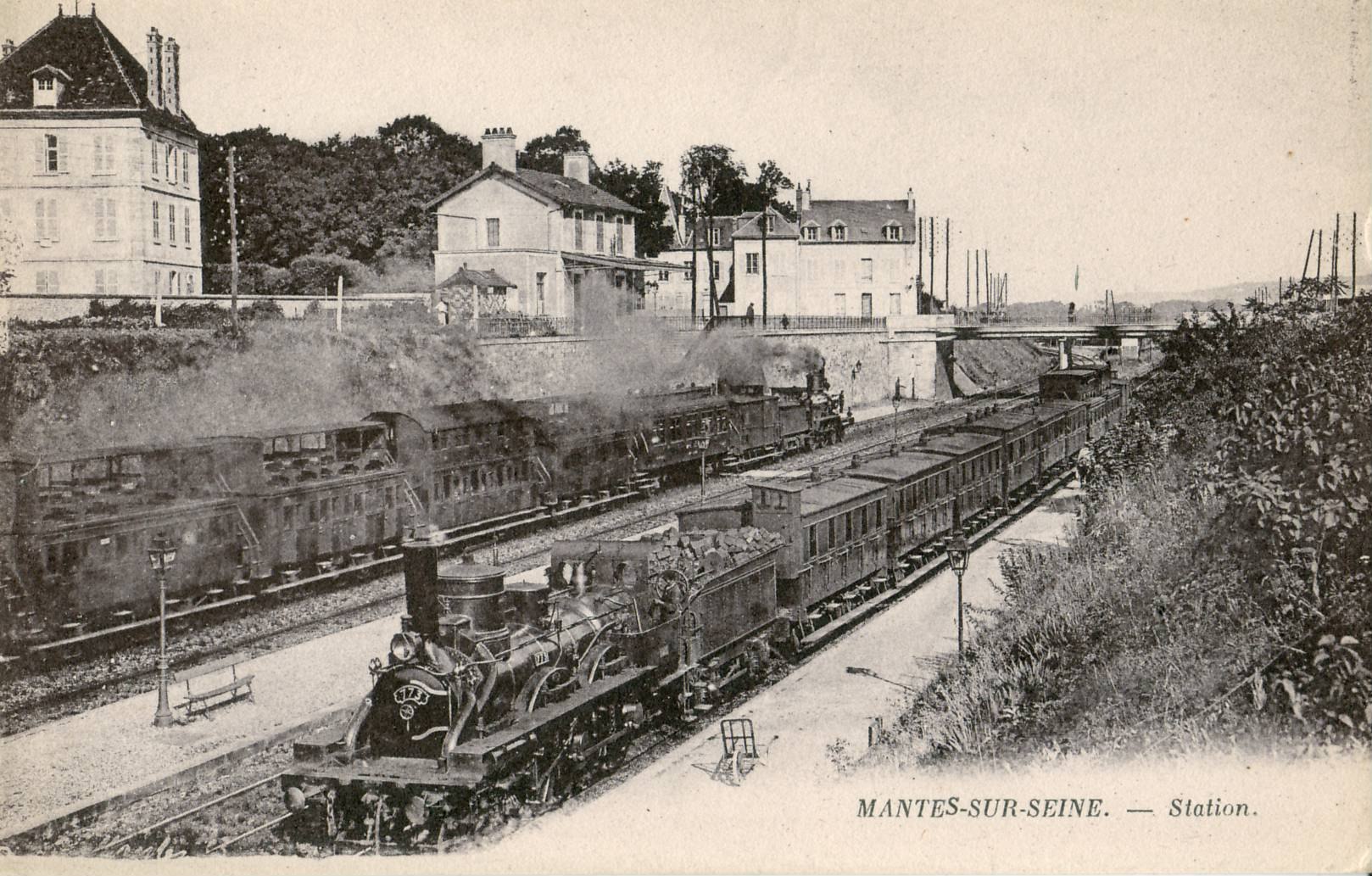 Carte postale ancienne éditée par Neurdein Mantes-la-Ville : Gare de Mantes - Station Au premier plan, locomotive N°173, au second plan, rame de banlieue à impériale (ouvertes et fermées) dite "Bidel"